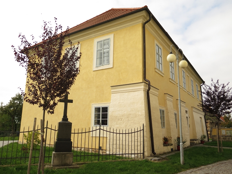 Fara, Kostelní 141, Dolní Bousov.